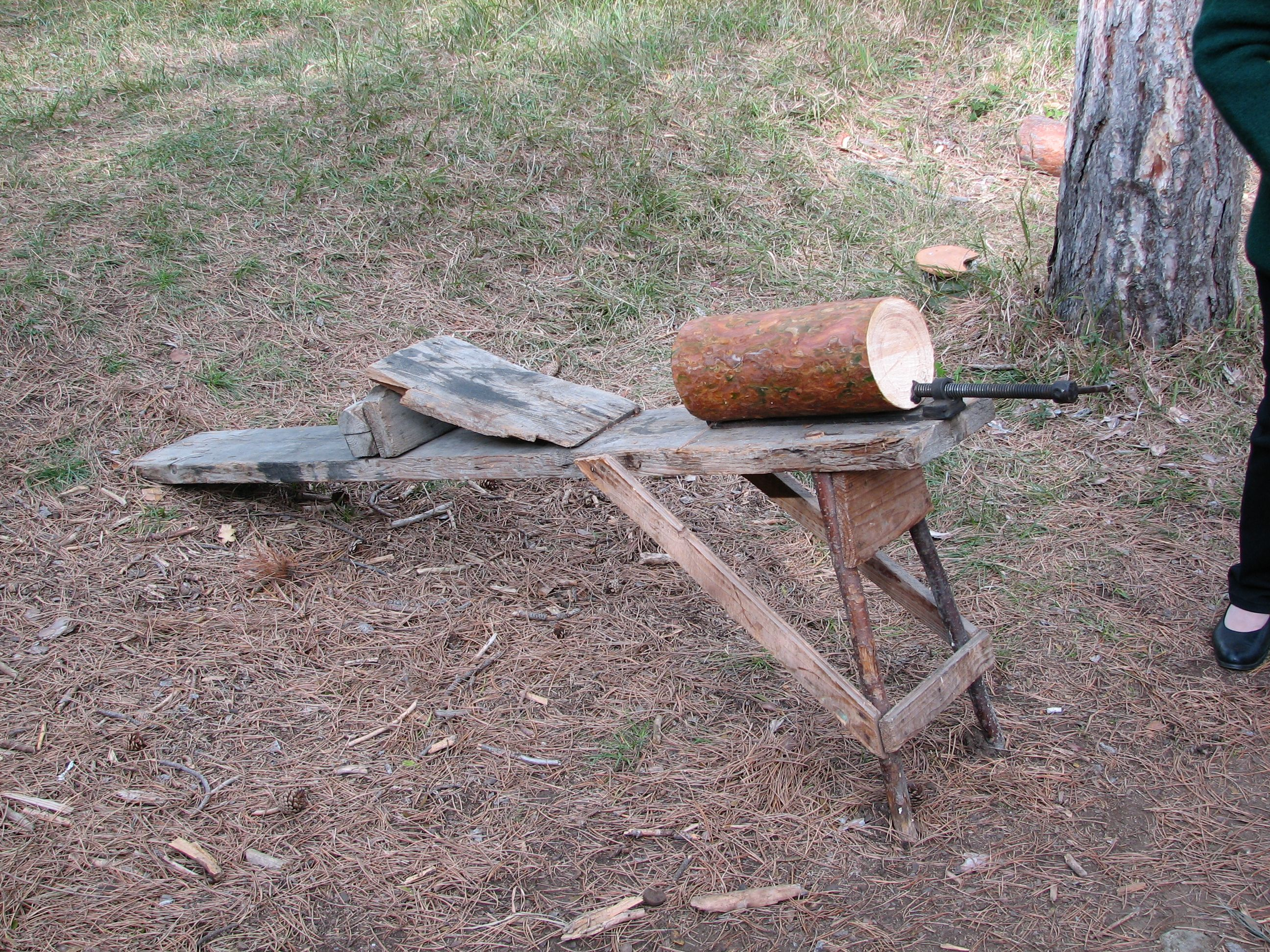 Schartenhobelbank zum Hobeln von Pechscharten mit eingespanntem Schwarzkiefernstück.